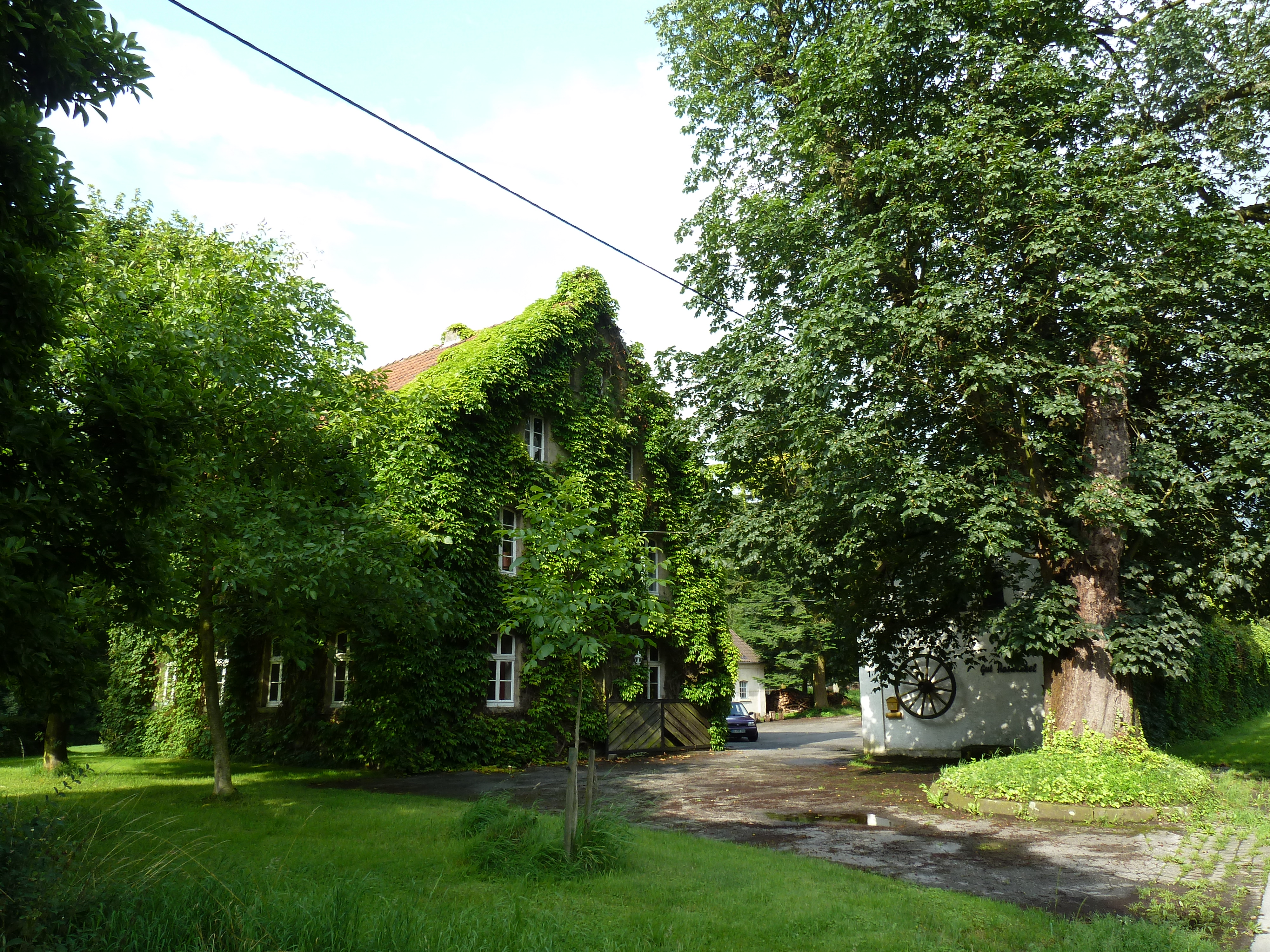 Neu-Haswinkel